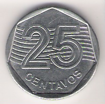 Frente da moeda de 25 centavos da primeira geração. Cunhada em 1994. This graphic was created with GIMP.